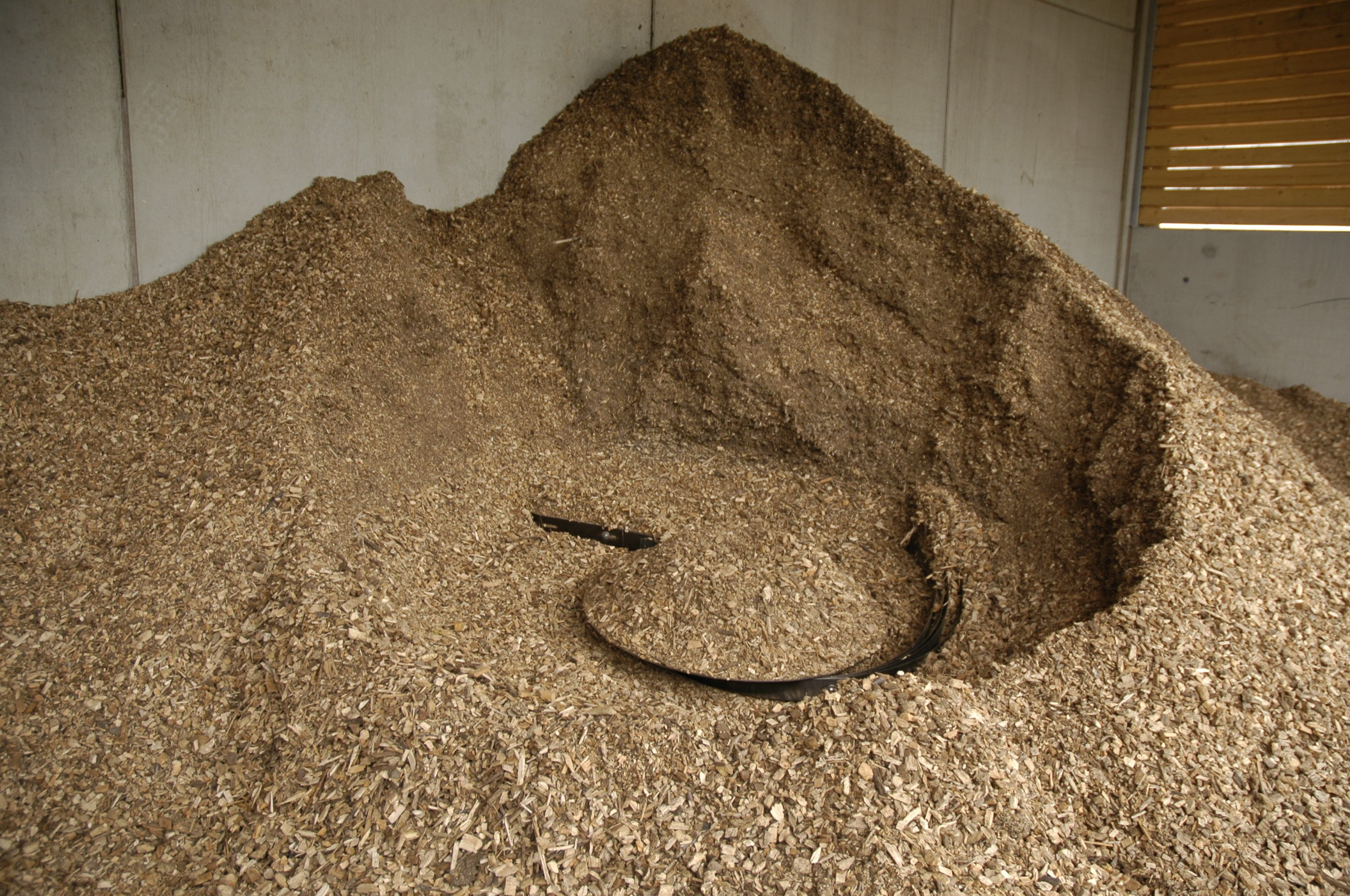 Die Hackschnitzel werden aus dem Lager mittels einer Raumaustragung (Federblattrührwerk) zum Heizkessel ausgetragen